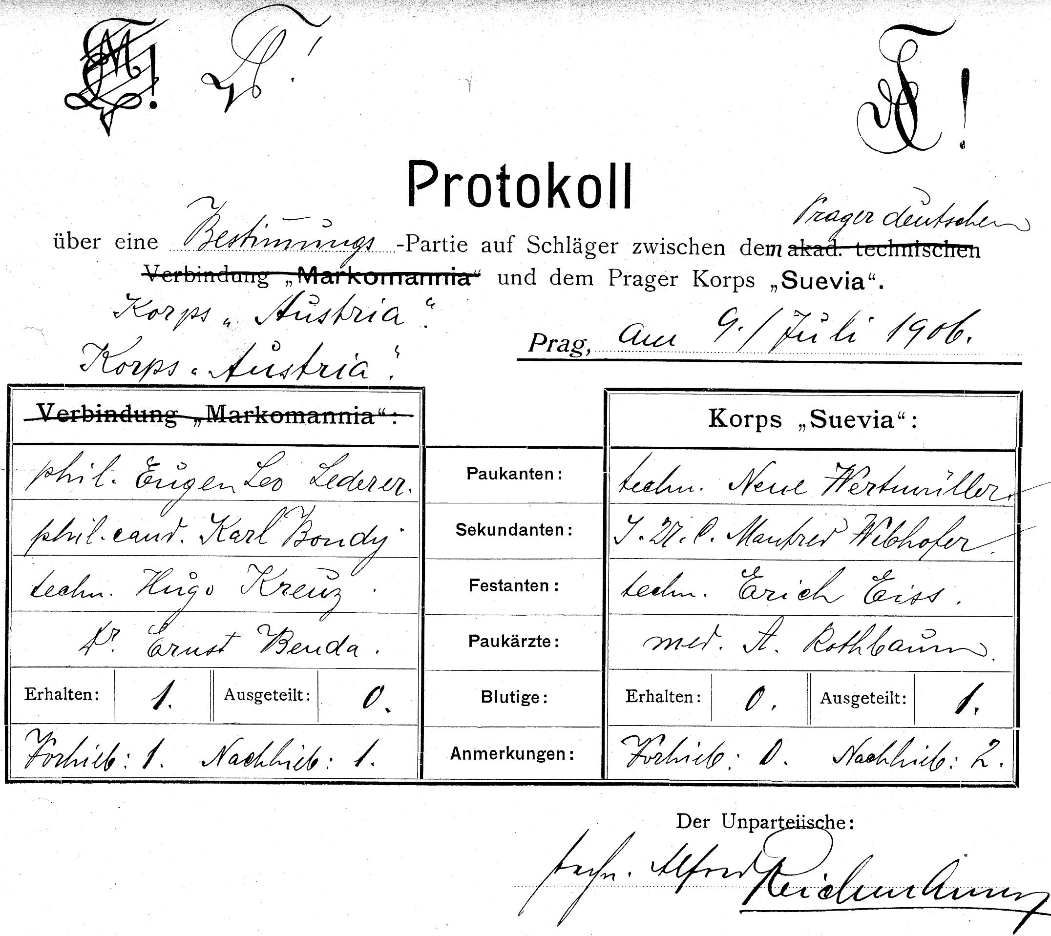 Protokoll über eine studentische Mensur in Prag 1906. Fechter aus Seiten Corps Austria war Eugen Leo Lederer (1884-1947)